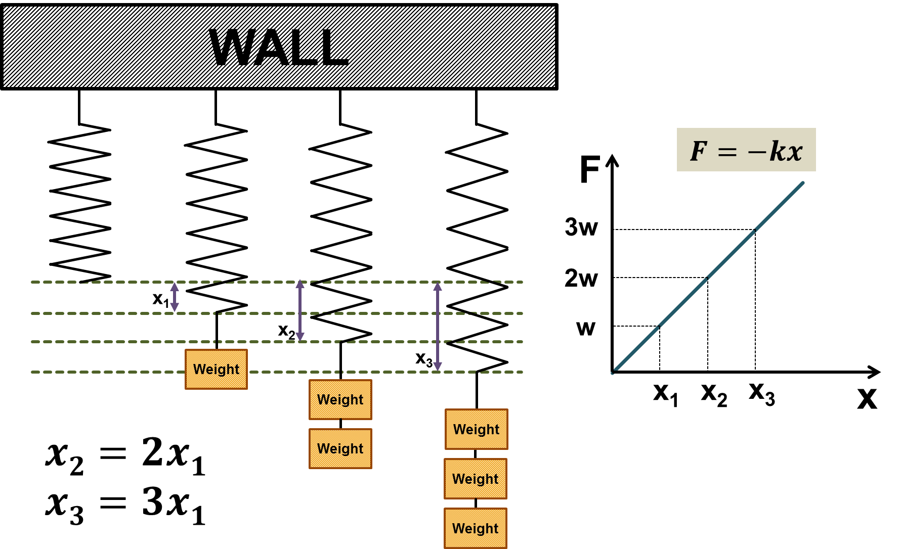 훅의 법칙을 그림으로 나타낸 것이다.